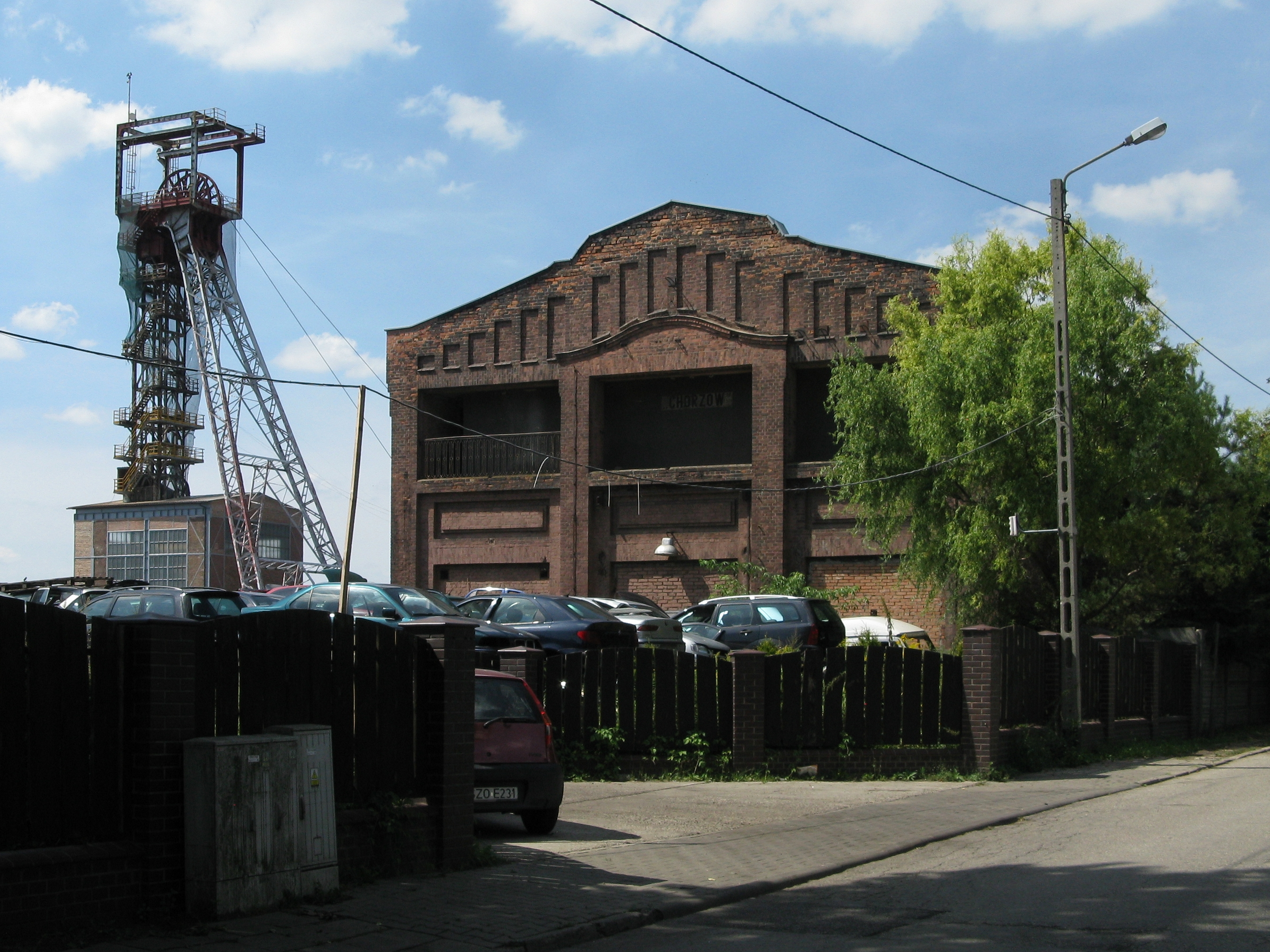 Zabudowania zlikwidowanej kopalni węgla kamiennego Barbara-Chorzów w Chorzowie Starym, z lewej wieża wyciągowa szybu Kolejowego I.